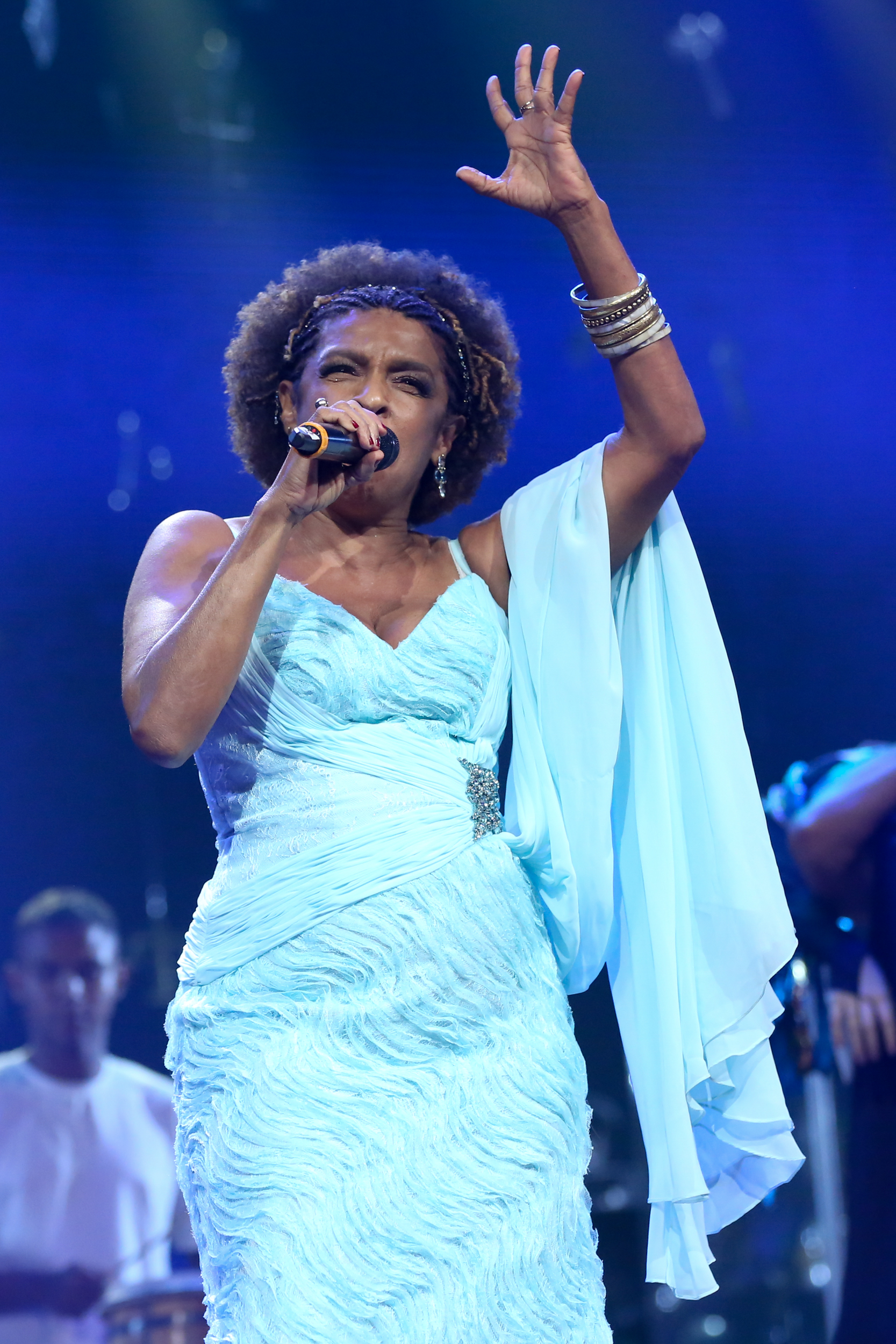 Elisa Lucinda - 26° Prêmio da Música Brasileira 2015, no Theatro Municipal, no Centro do Rio de Janeiro/RJ. (10/06/15) Foto: Roberto Filho/Divulgacão